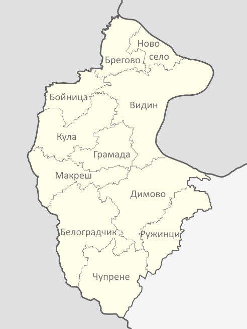 Картата е създадена от Любомир Таушанов